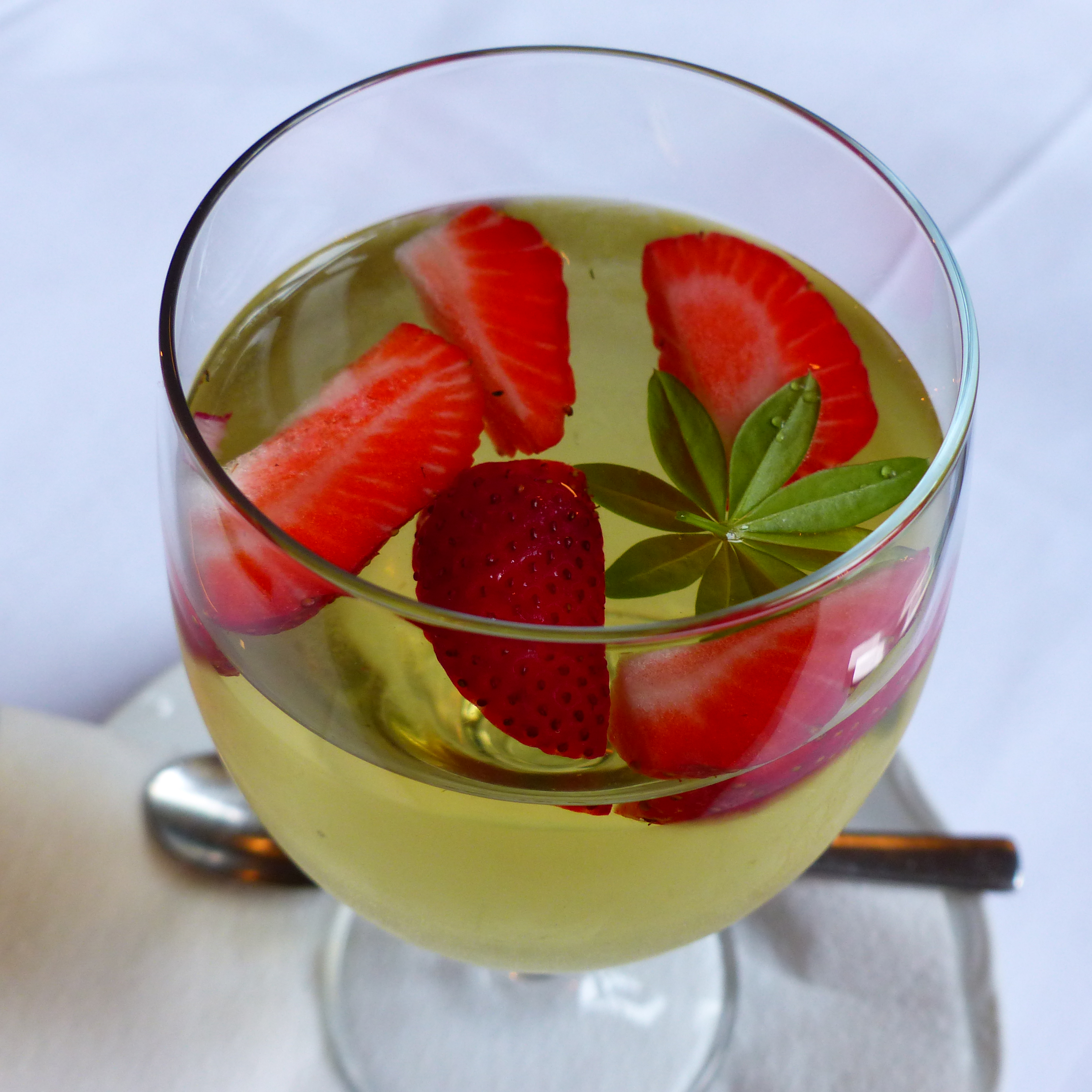 Maibowle, Restaurant "Kanzlei", Dresden-Striesen